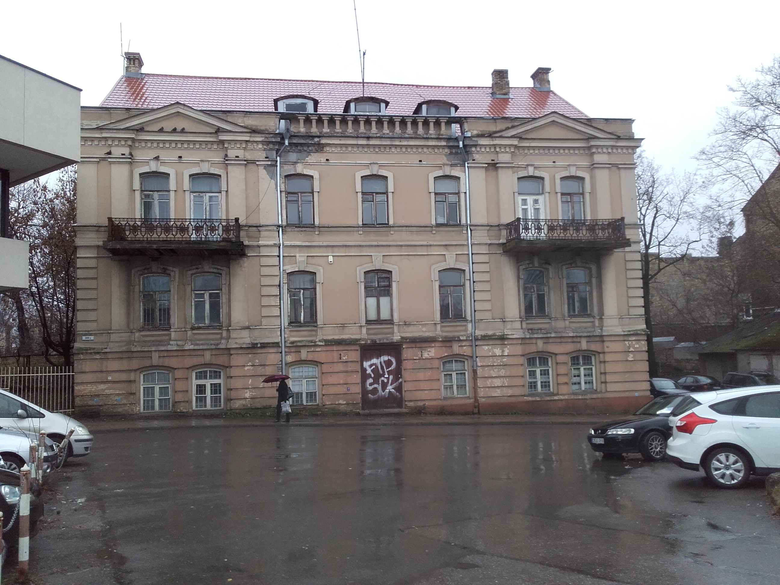 Transporto policijos tarnyba